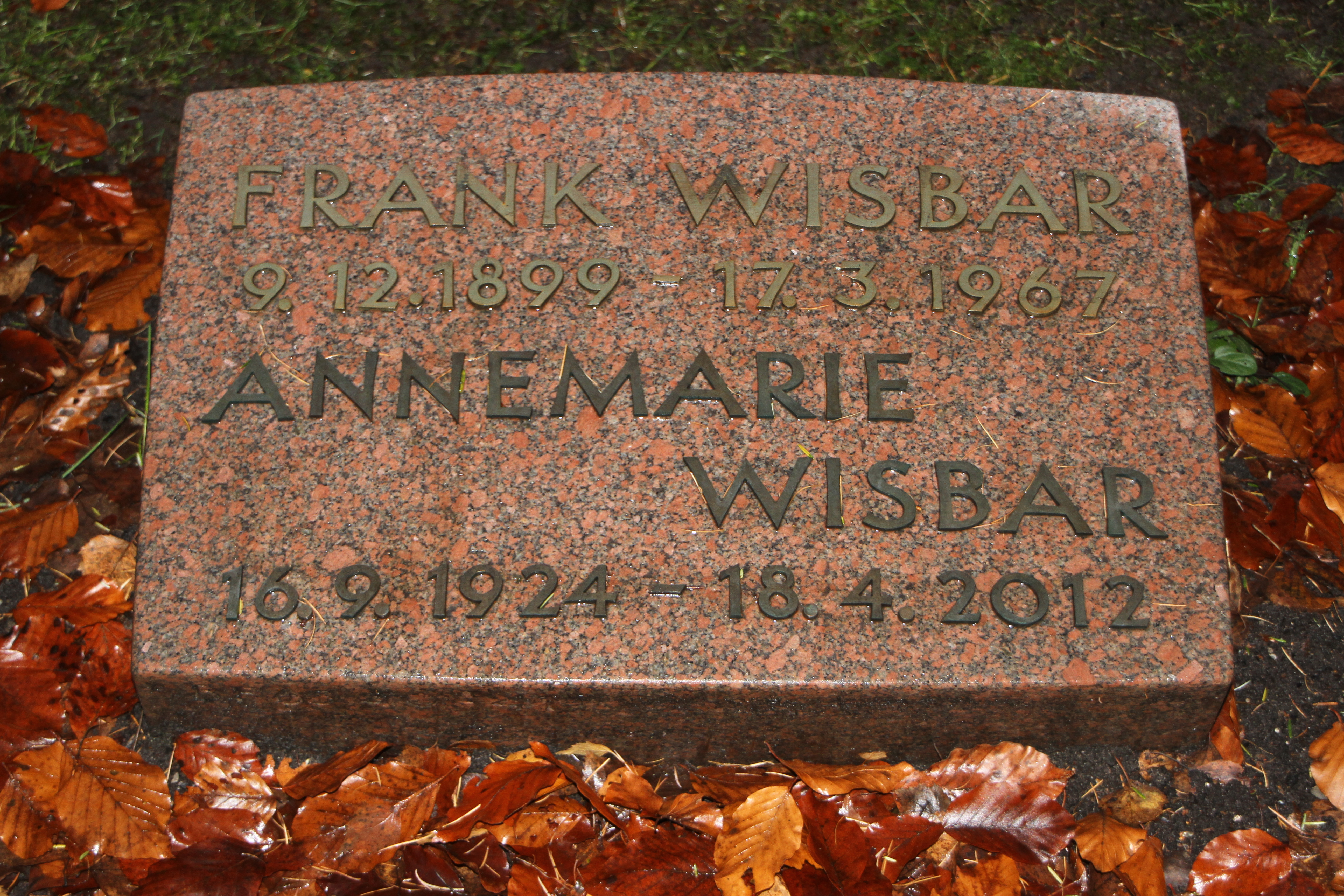 Frank Bentick Wisbar, geboren als Frank Wysbar (* 9. Dezember 1899 in Tilsit; † 17. März 1967 in Mainz), gilt als bedeutender Filmregisseur des 20. Jahrhunderts, der sowohl mit deutschsprachigen Werken als auch mit amerikanischen Filmen und TV-Serien Erfolge feiern konnte. Er arbeitete mit zahlreichen Schauspielern zusammen, die den deutschen Nachkriegsfilm und das deutsche Fernsehen seit den 1950er-Jahren geprägt haben, darunter Dietmar Schönherr, Brigitte Horney, Horst Frank und Günter Pfitzmann. Zu seinen bekanntesten Werken gehört Hunde, wollt ihr ewig leben.